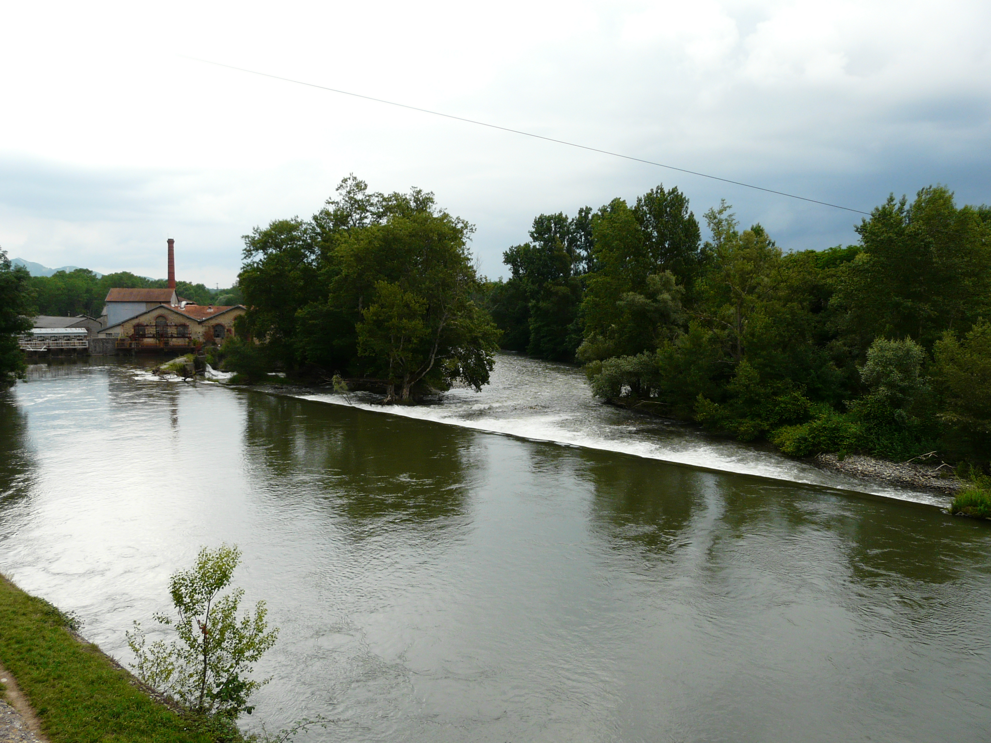 La Garonne en contrebas de l'église de Saint-Martory, Haute-Garonne, France. Le barrage permettait d'alimenter en eau une ancienne papeterie (visible à gauche) et, à gauche de celle-ci, le canal de Saint-Martory.